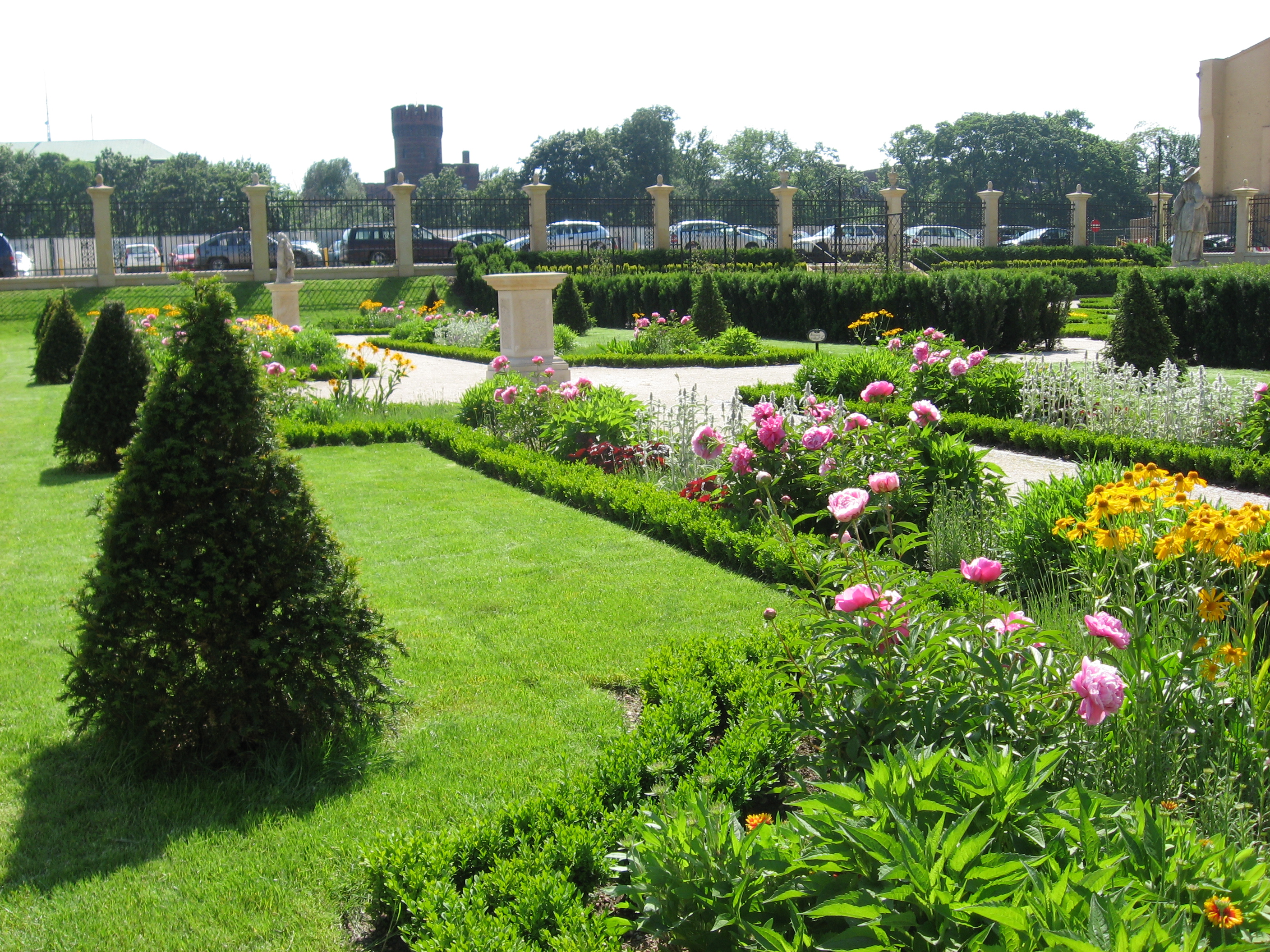 Ogród Barokowy przy Muzeum Miejskim Wrocławia